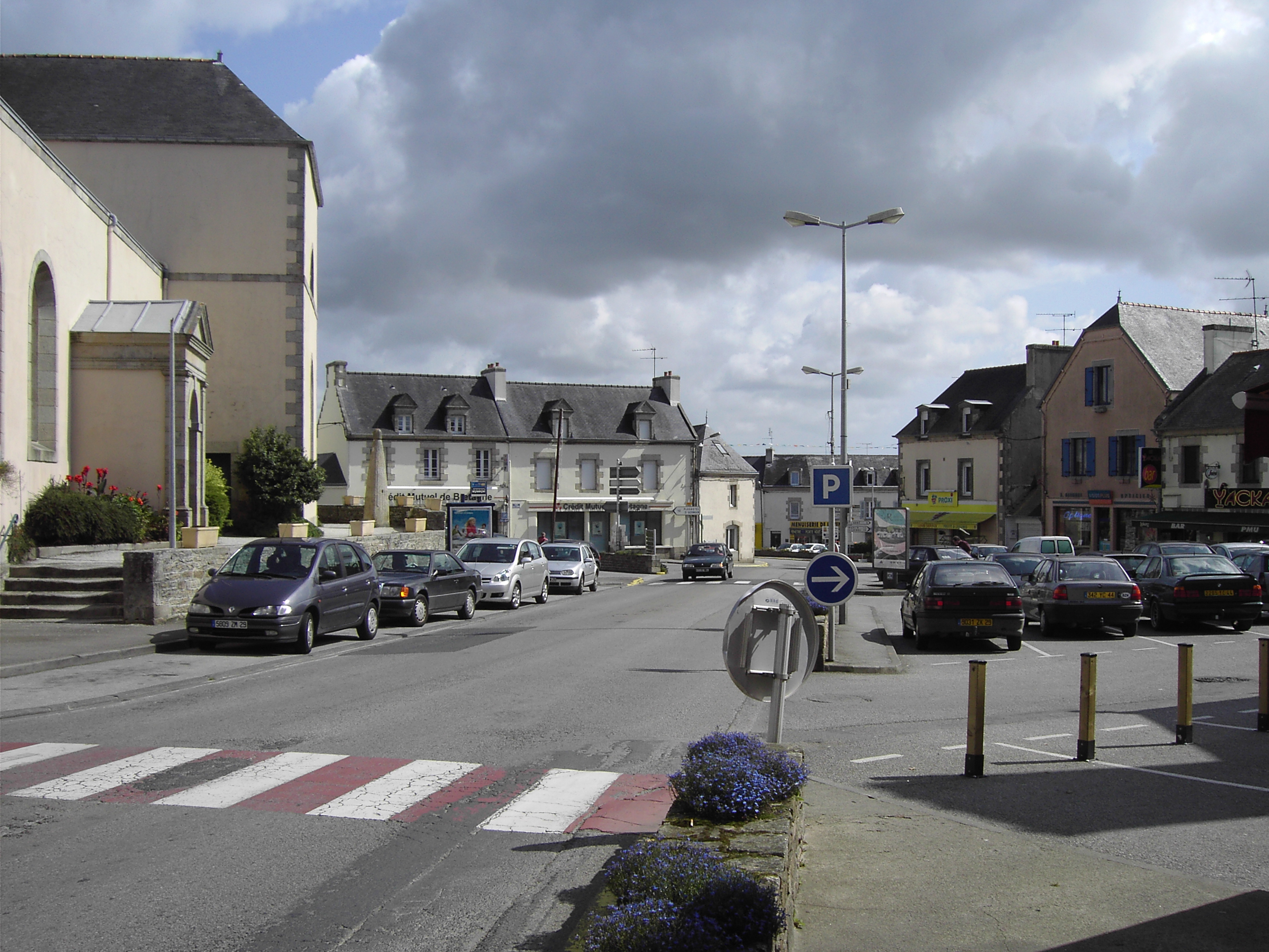 Commune de Plonéour-Lanvern, dans le finistère